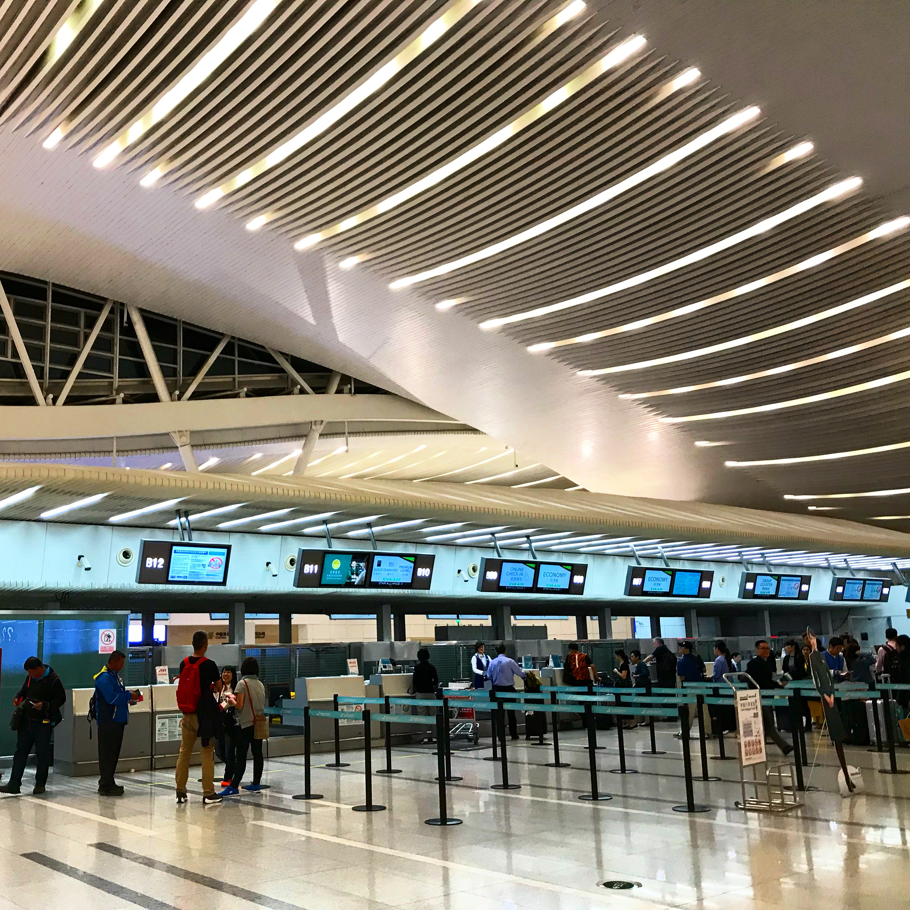 杭州 / Hangzhou - 蕭山國際機場